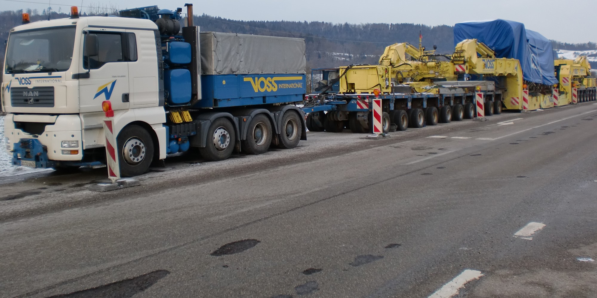 Auf der Landesstraße 1066 abgestellter Schwertransport mit MAN-Schiffsdieselmotor auf modularem Goldhofer-Anhänger mit insgesamt 20 Achsen und 160 Rädern. Zwei weitere MAN-Zugmaschinen der Spedition Voss wurden separat geparkt. Der 460 Tonnen schwere Transport wurde mehrere Tage stillgelegt wegen unterschiedlicher Interpretation der Genehmigungen.